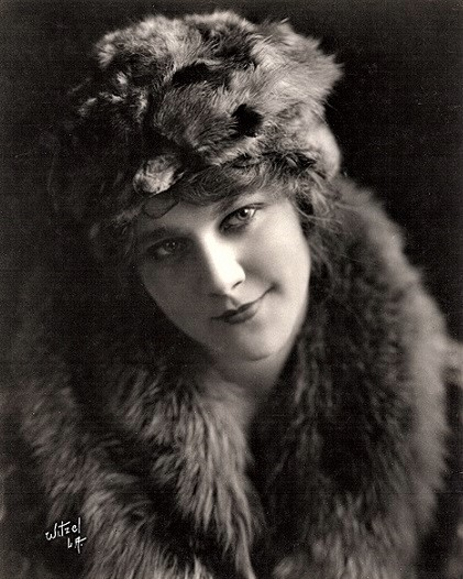 Louise Lovely